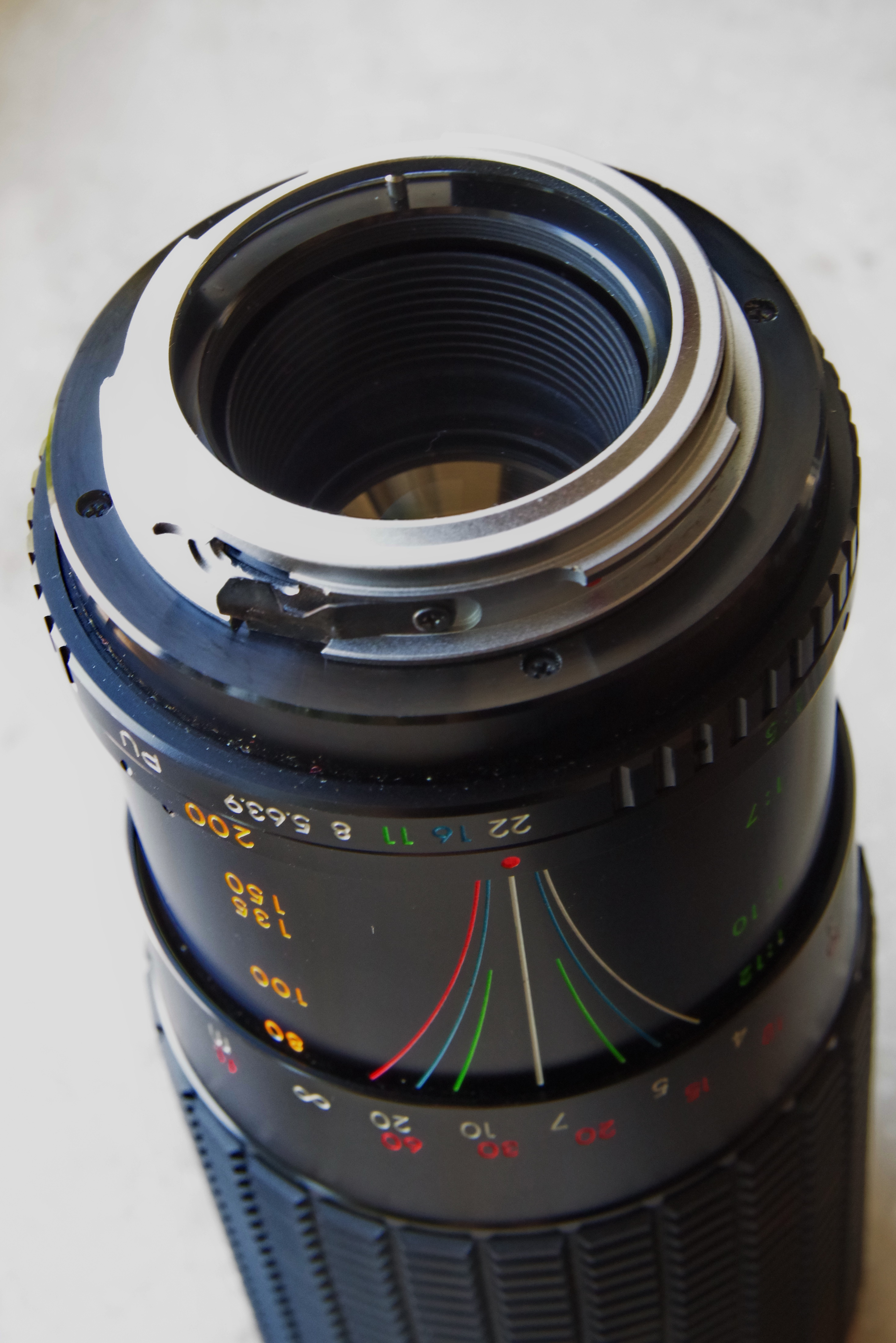 Adapter for M42 Lenses on Pentax cameras (PK mount) on a M42 zoom lens